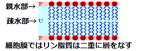 リン脂質二重層の基本図